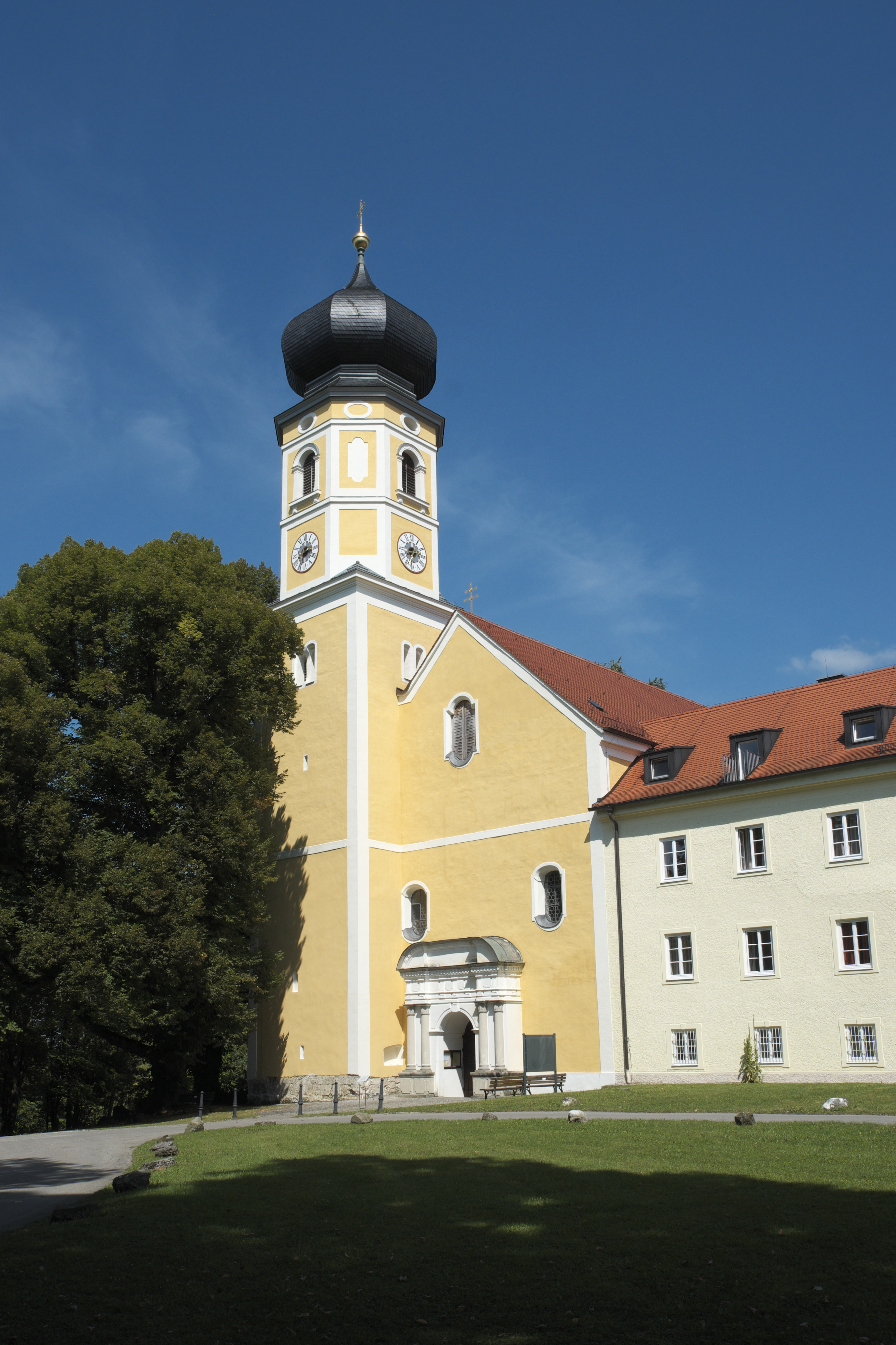 Katholische Pfarrkirche St. Martin, ehemalige Augustinerchorherrenstiftskirche, in Bernried am Starnberger See im Landkreis Weilheim-Schongau (Bayern/Deutschland)